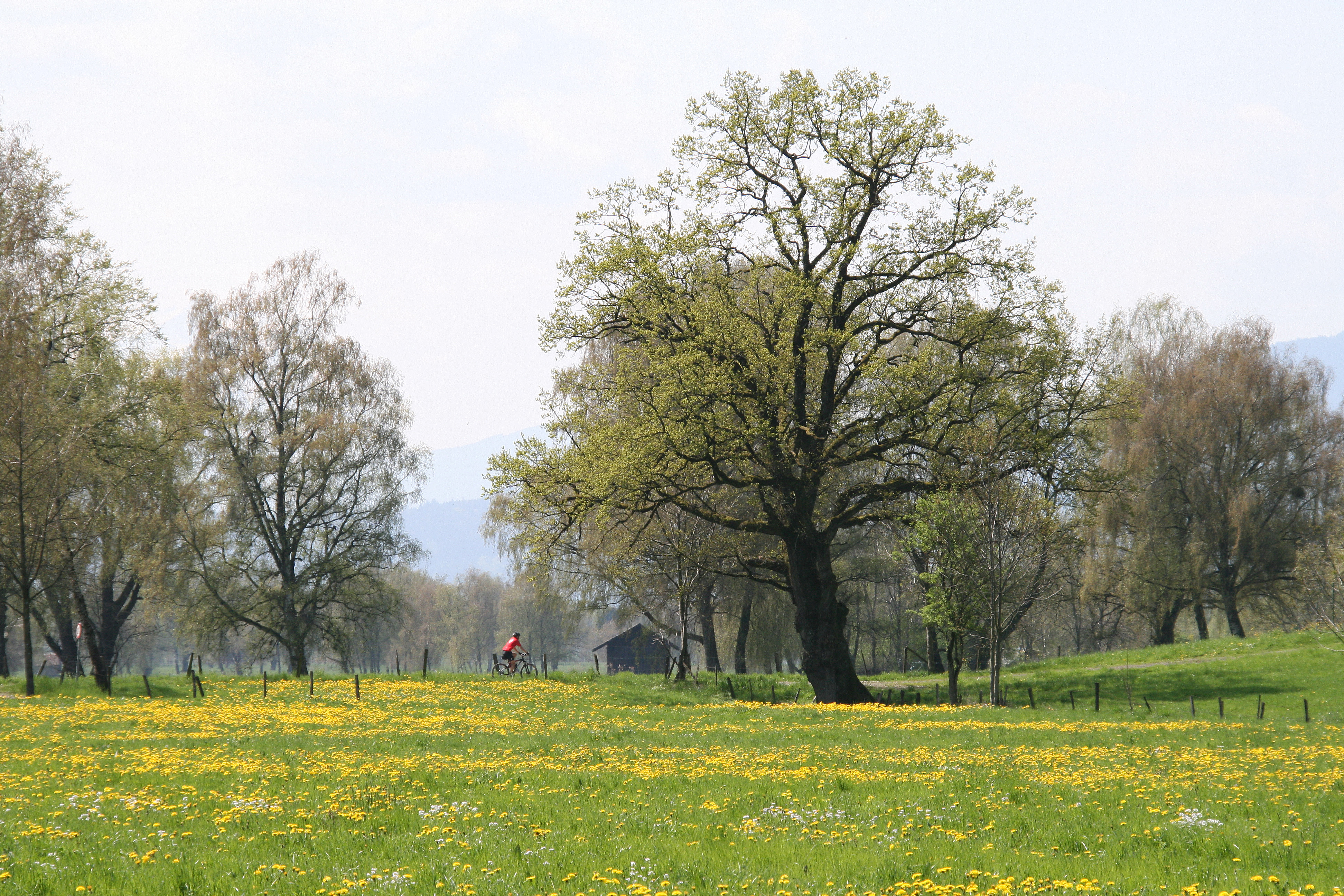 Kulturlandschaft Rheintalmoor in Lauterach, Vorarlberg Hier: neben dem “Jannersee”